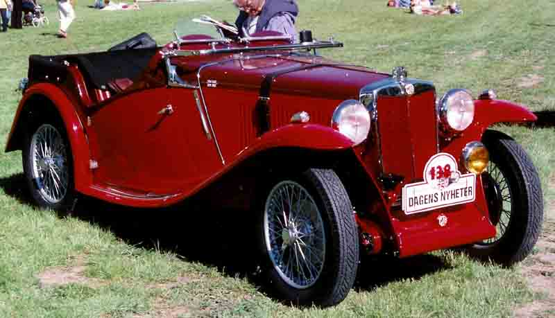 M.G. NA Magnette 4-Seater Tourer 1934